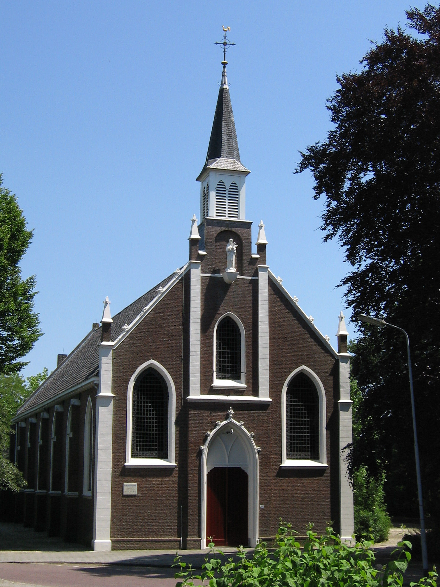 Rooms Katholieke Kerk OLV Hemelvaart in Ovezande, gemeente Borsele, NL.